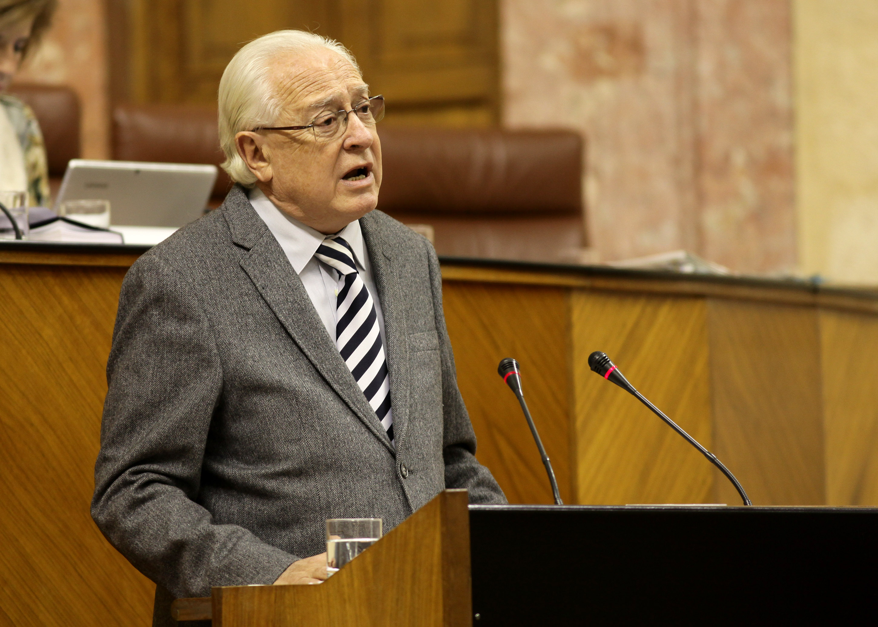 Parlamento de Andalucía. Sesión Plenaria 17/12/20